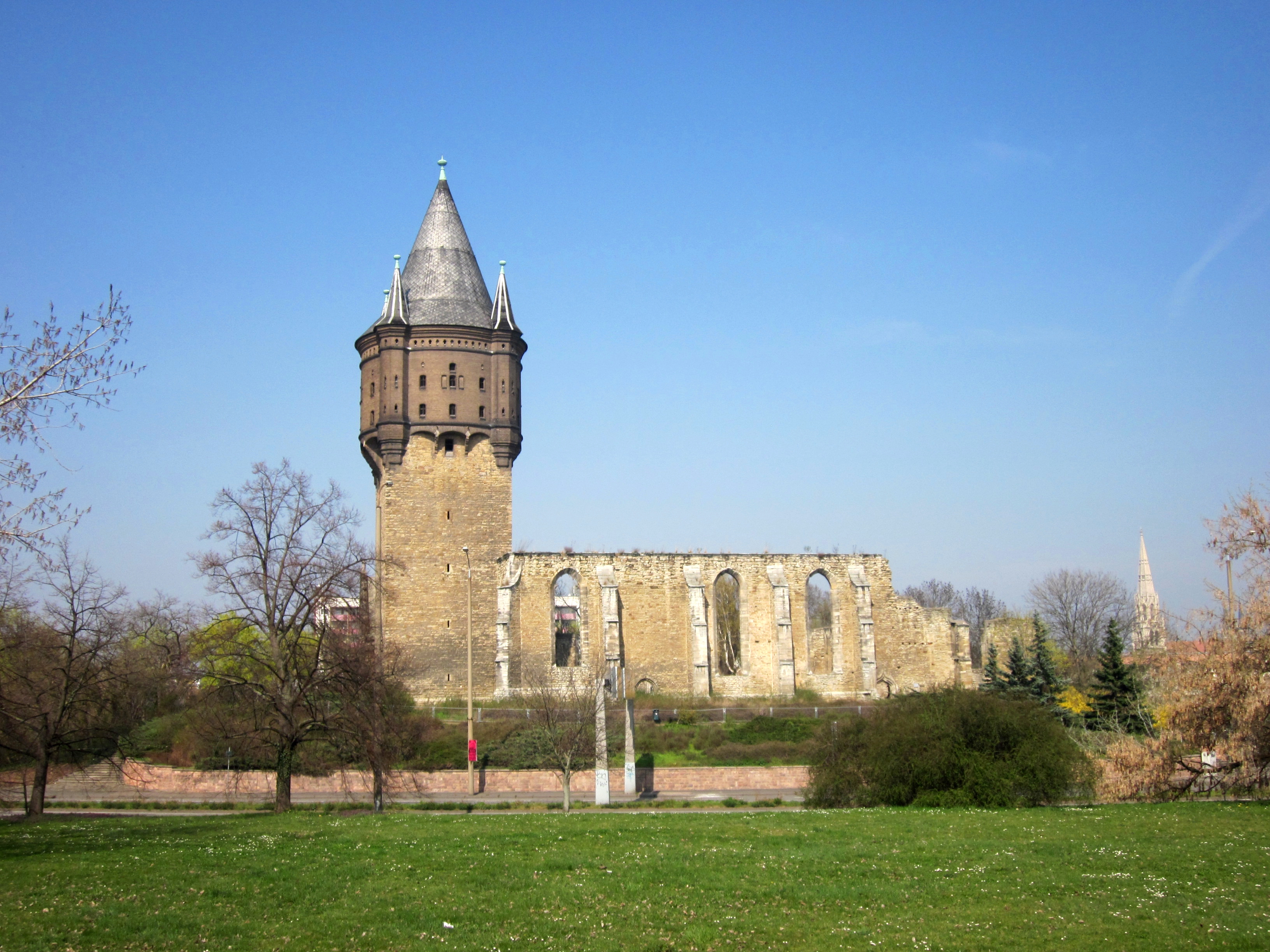 Ruine der Sixtikirche in Merseburg